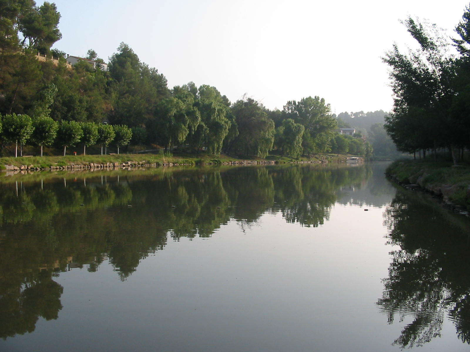 Embassament artificial a Navarcles